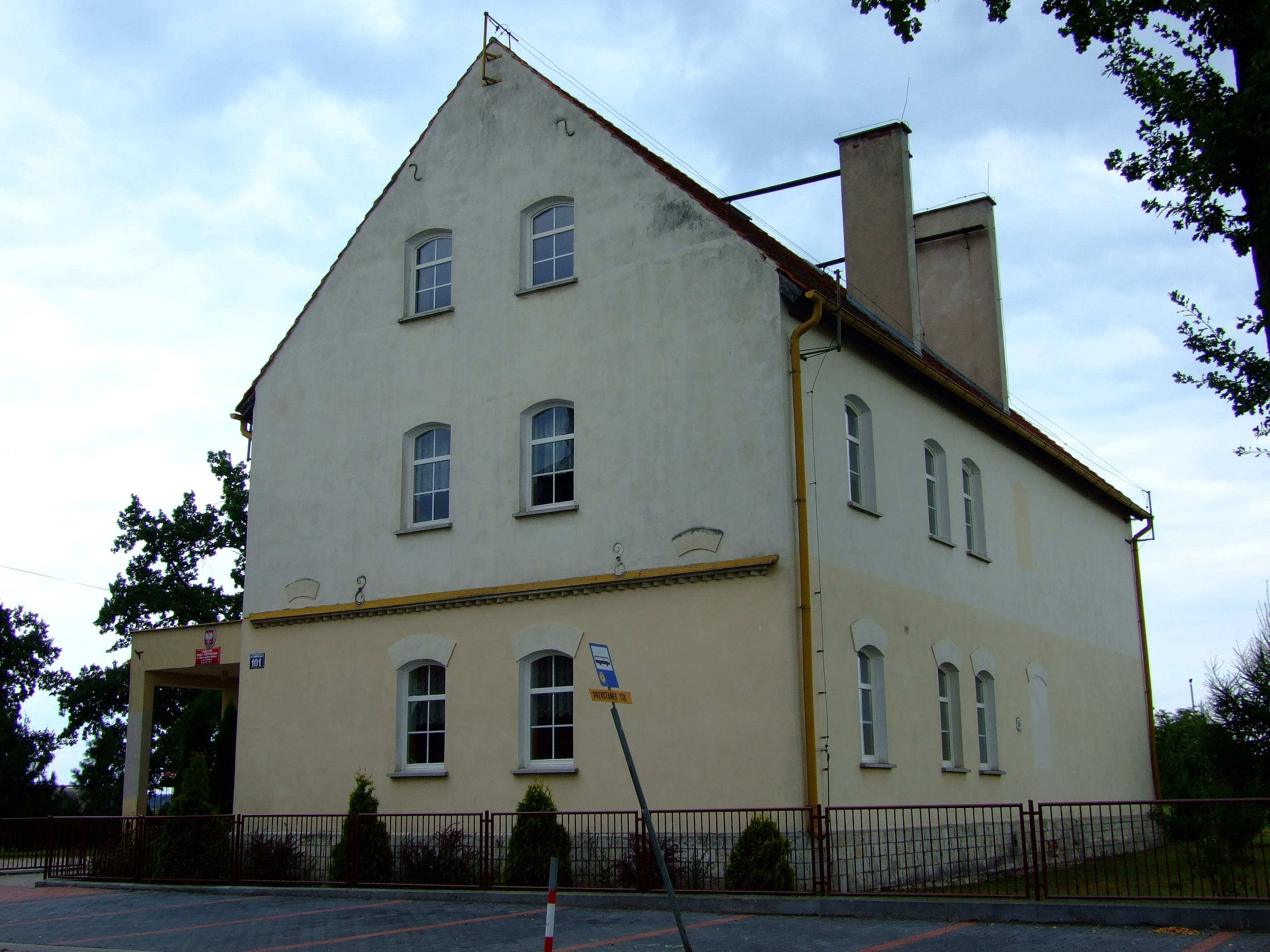 Szkoła podstawowa w Piotrówce (woj. opolskie)